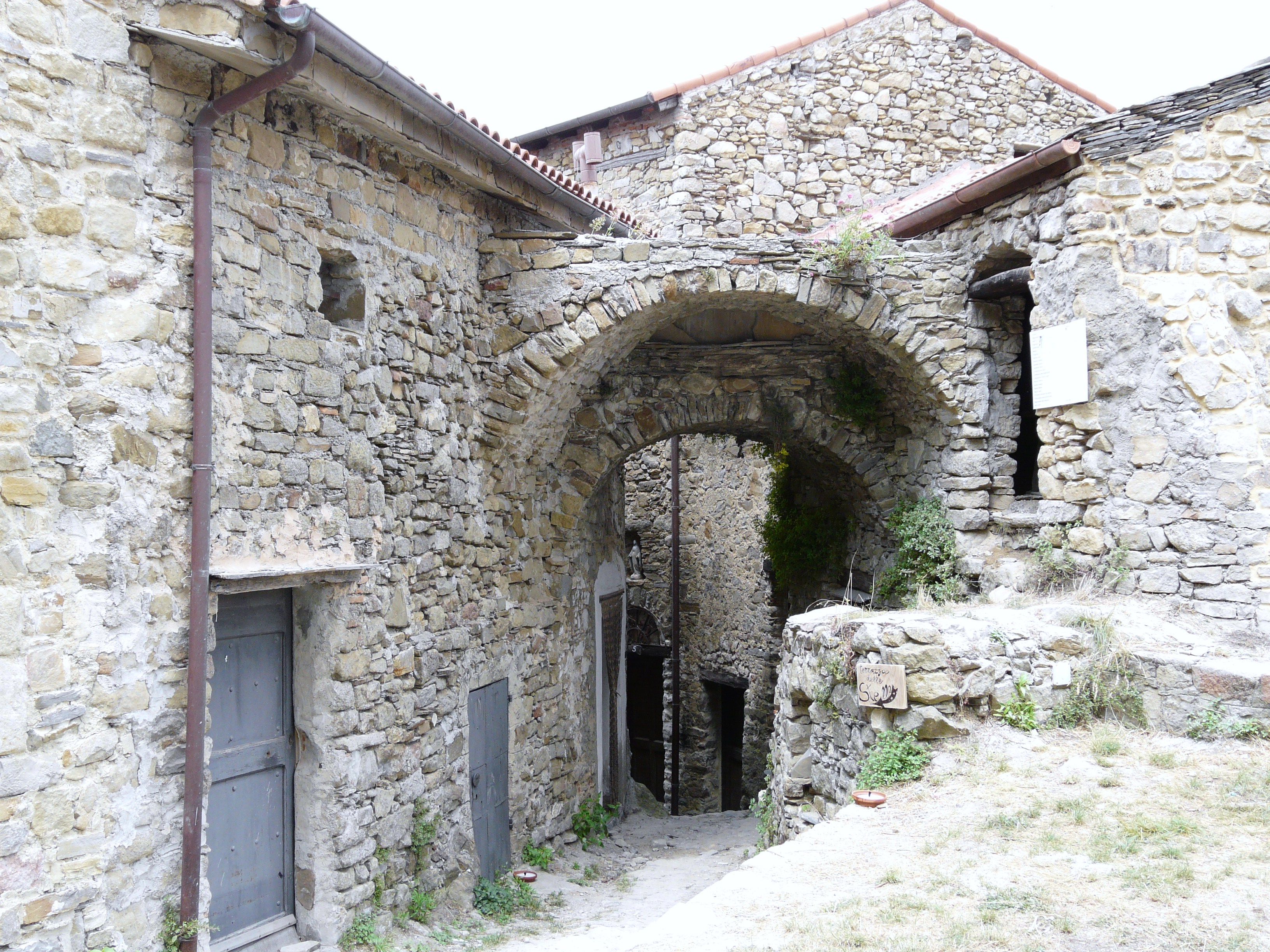 Bajardo, Liguria, Italia